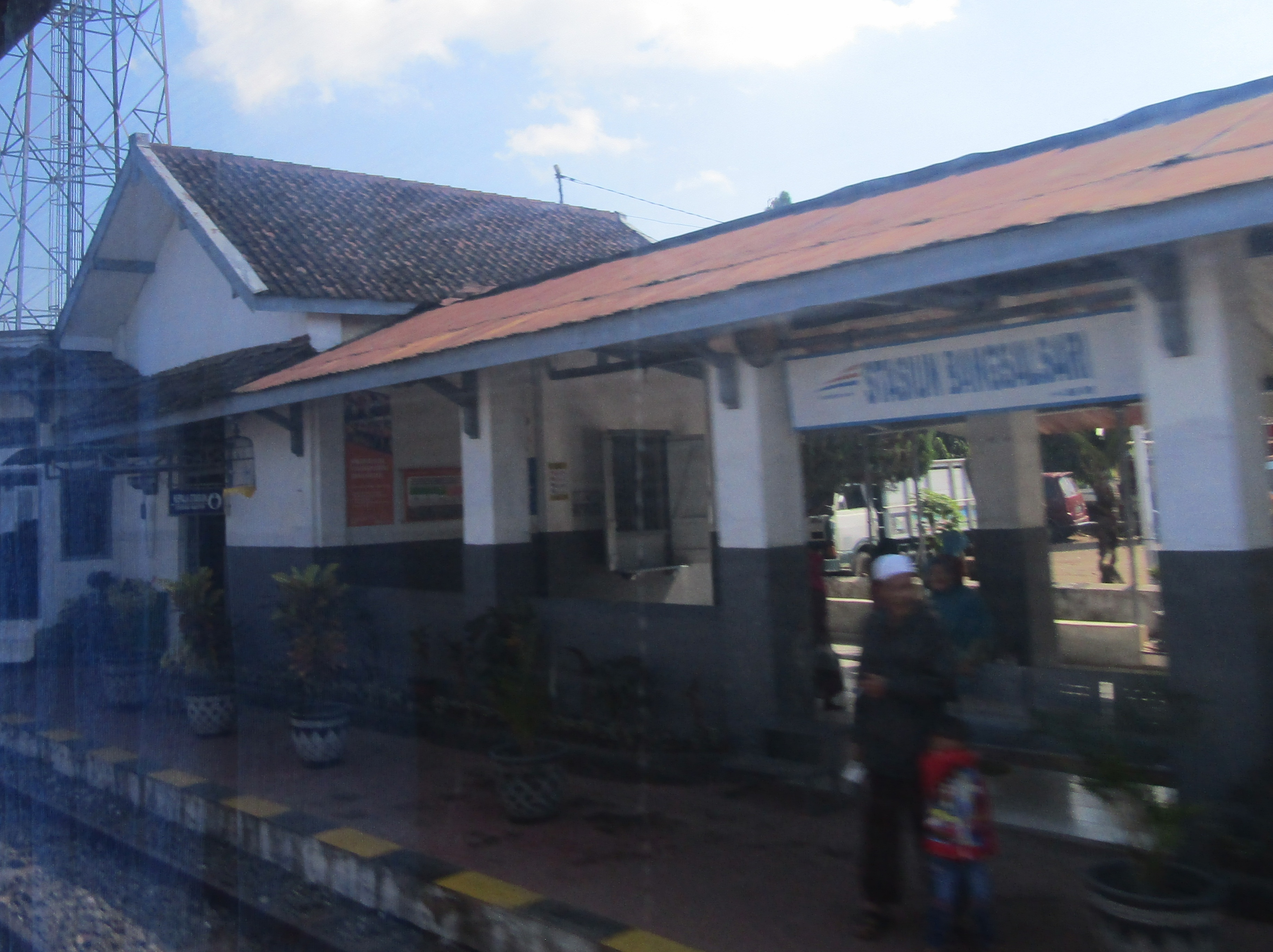 Stasiun Bangsalsari, 2019